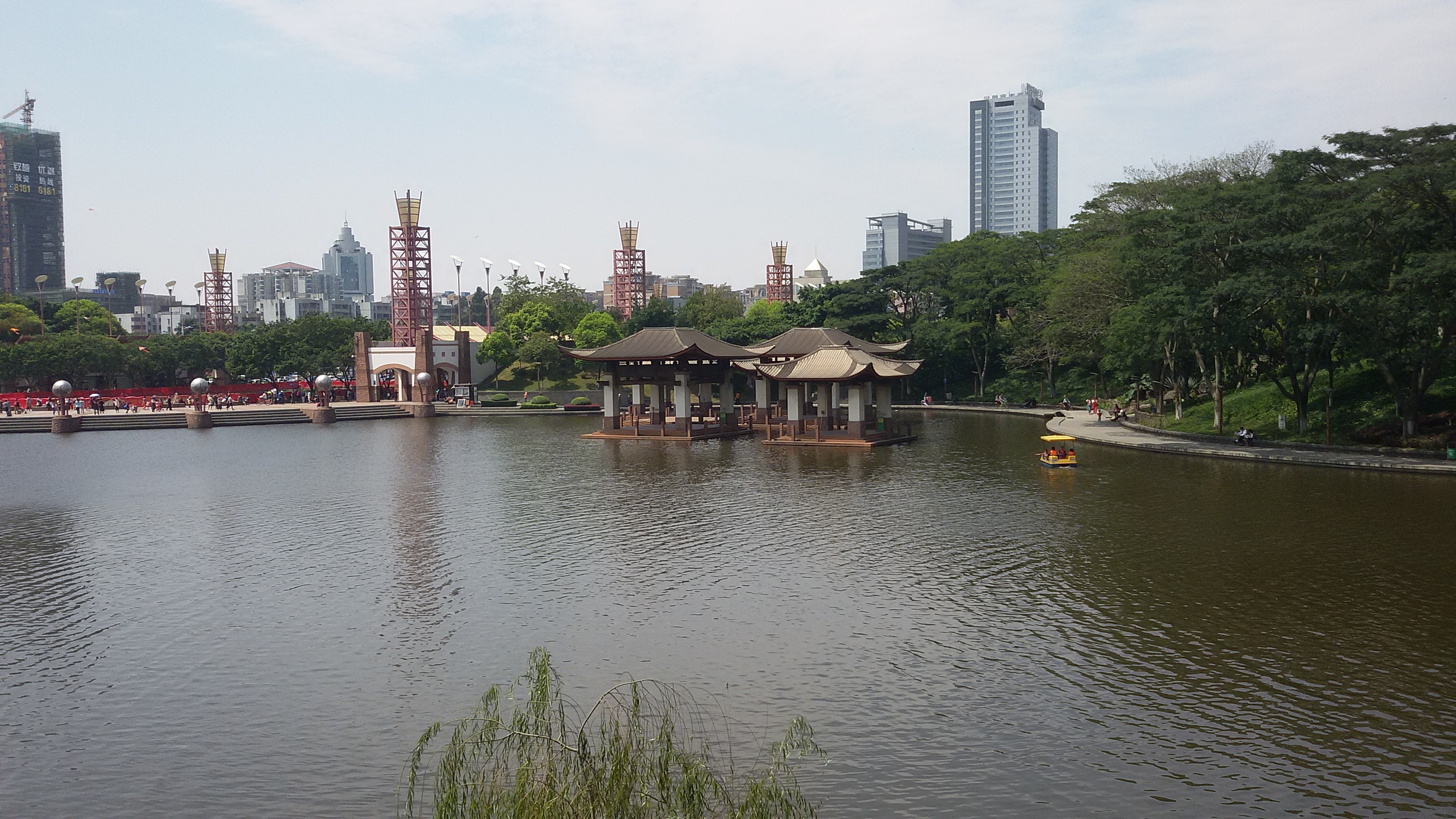 粵語: 千燈湖公園